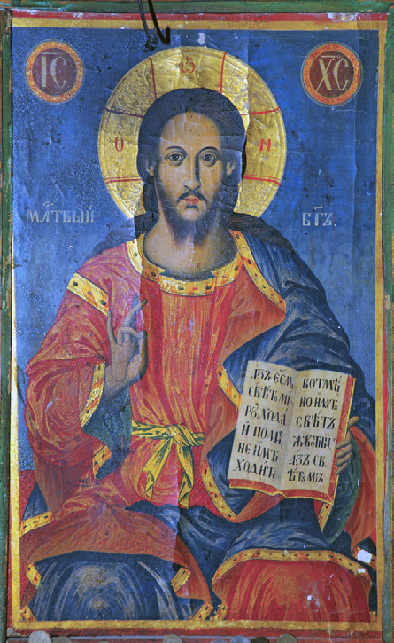 Икона в църквата "Свети Георги" в Жегляне.